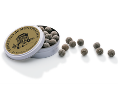 Boite de Grisettes de Montpellier, spécialités à la réglisse et au miel